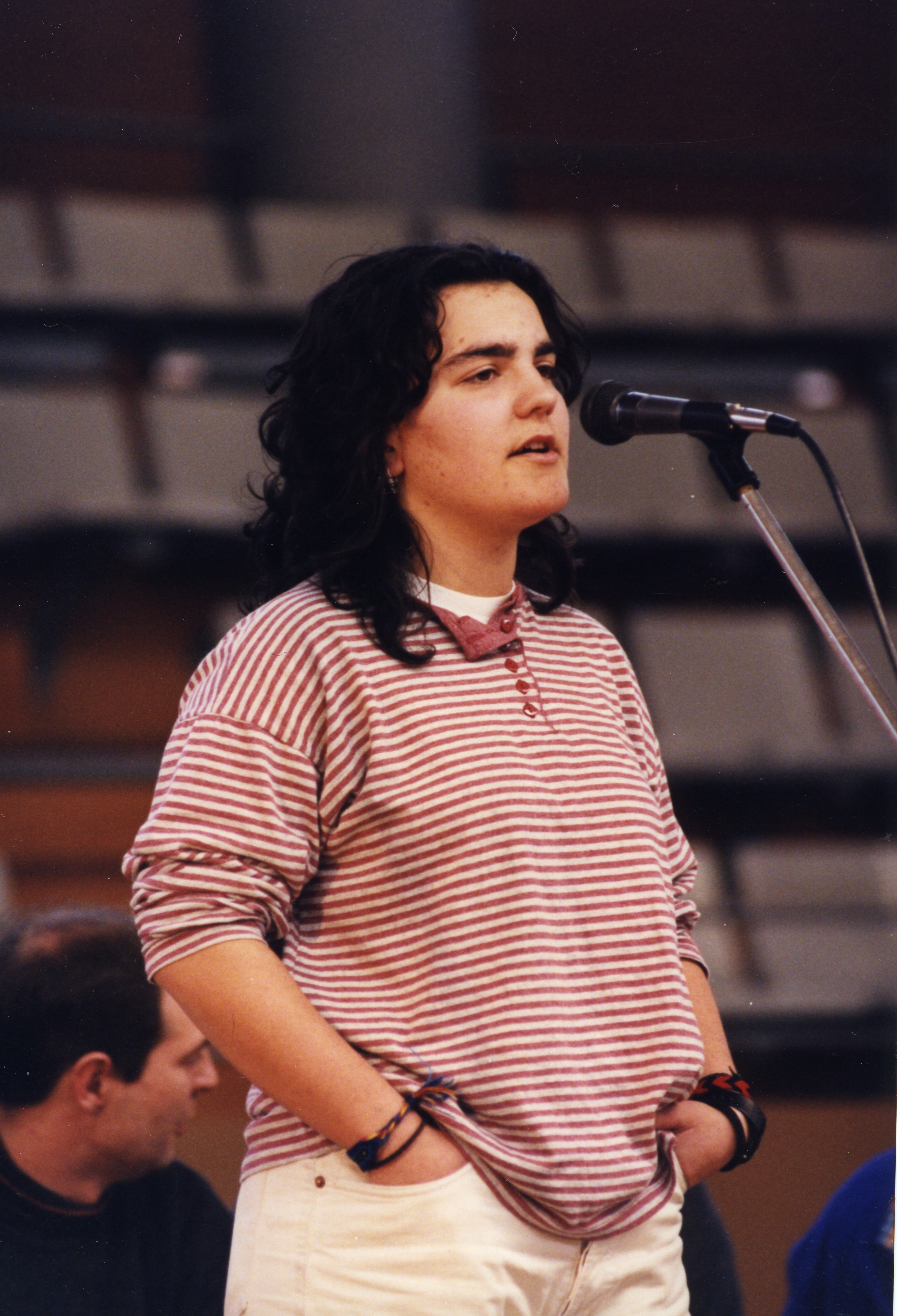 Maialen Lujanbio. Aiurri 11 zbk. 5. orr.